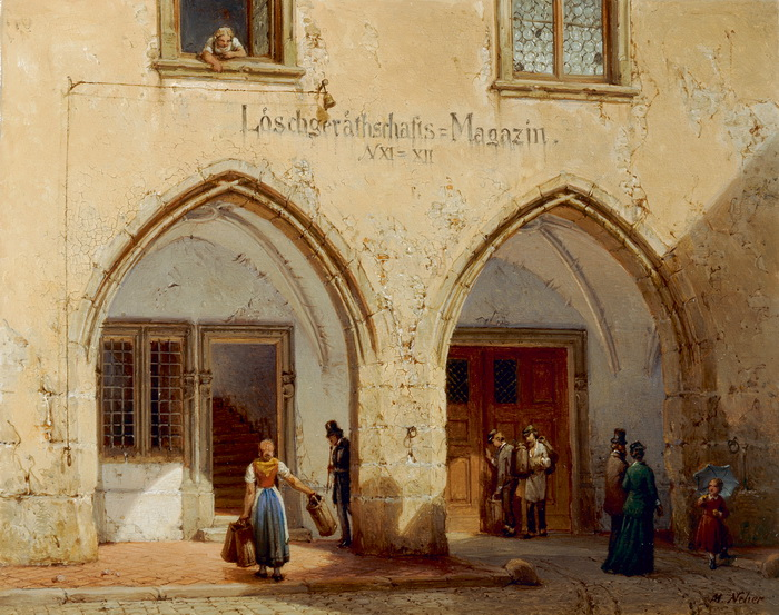 also: Antonierkirche